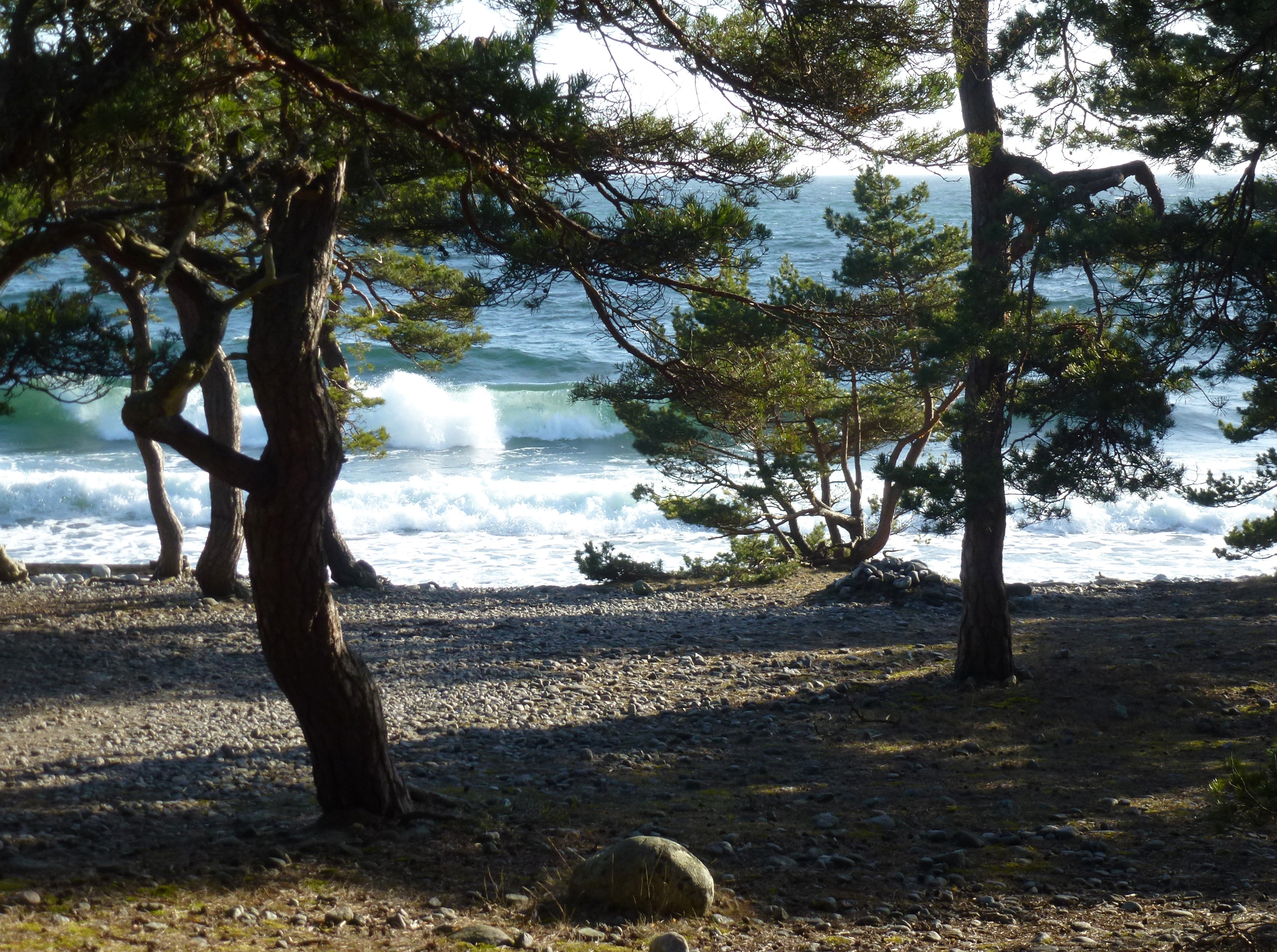 Örens naturreservat